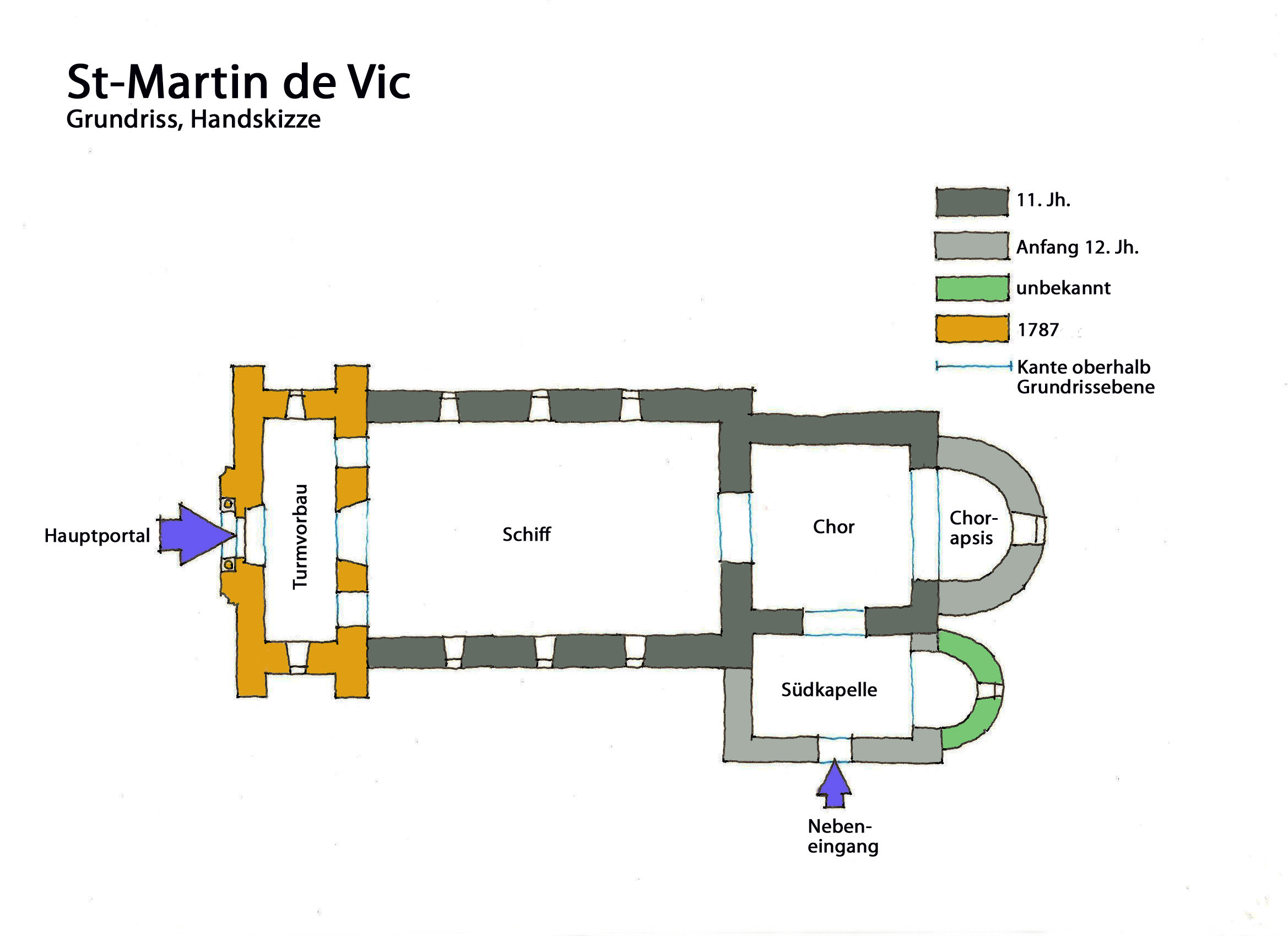 St-Martin de Vic, Grundriss, Handskizze